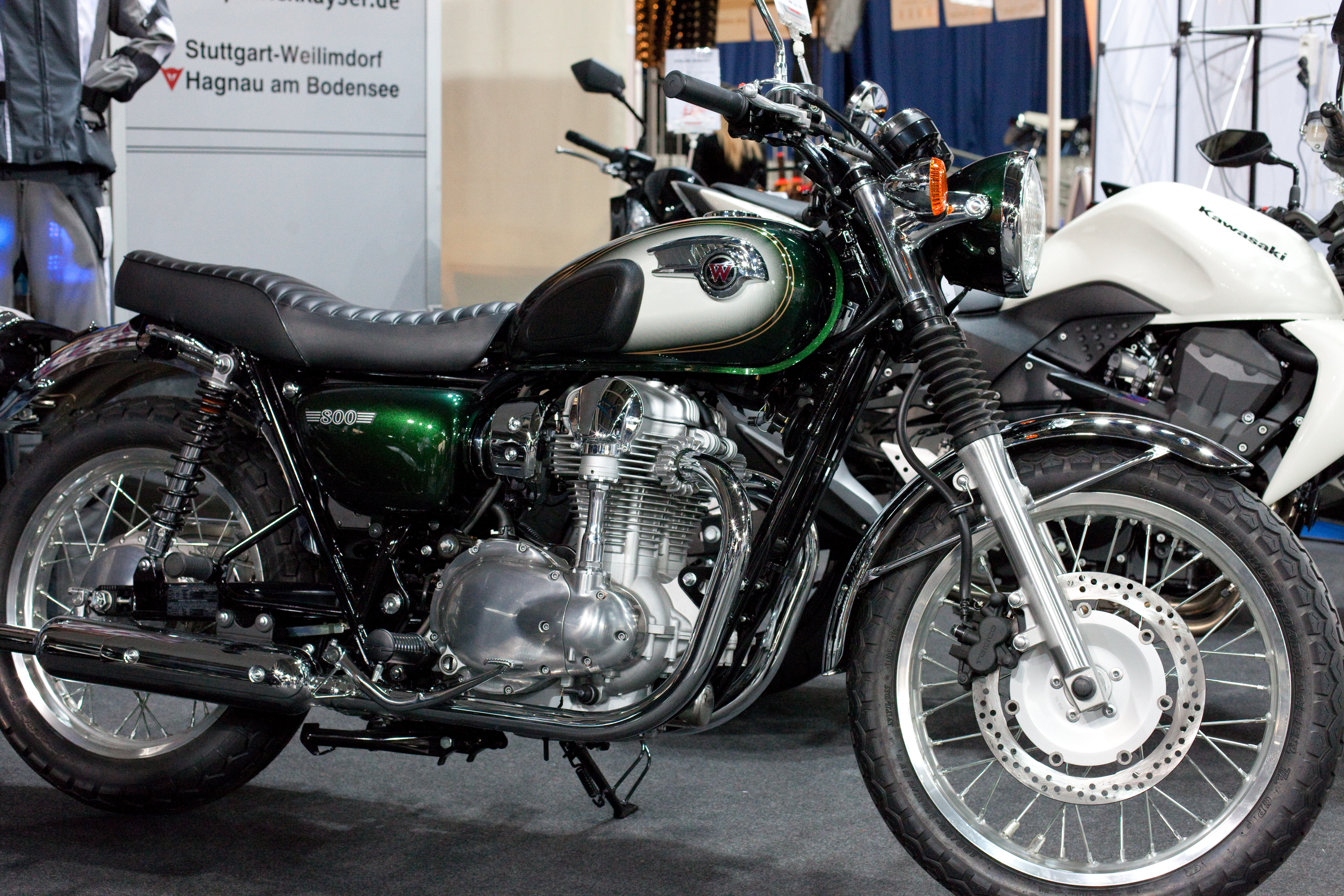 Kawasaki W 800